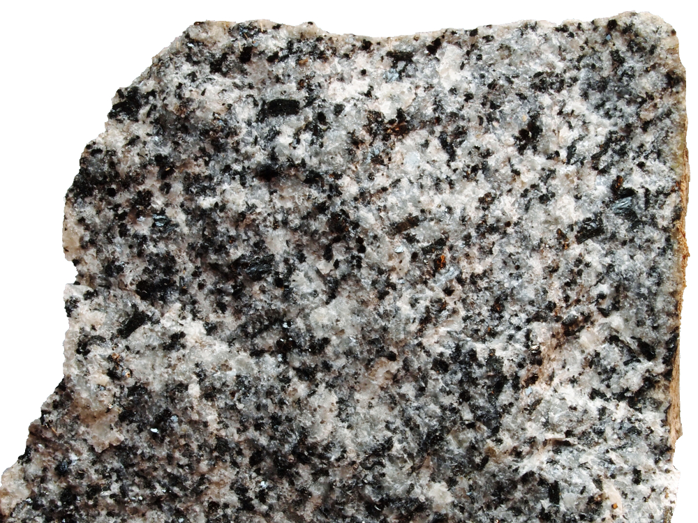 Vzorek pochází z lomu v Krhanicích. Skutečná šířka vzorku je 12 cm.